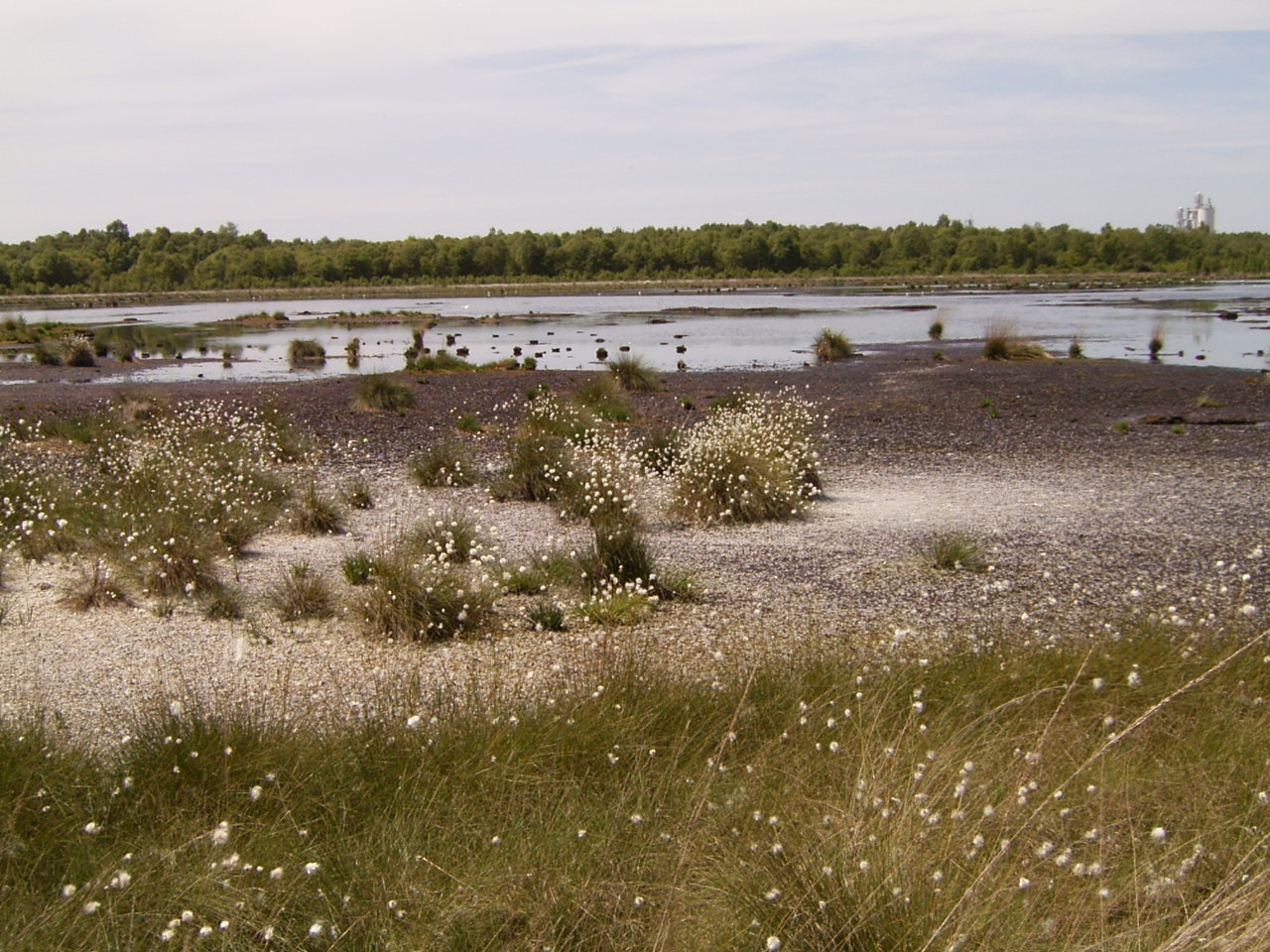 Scheidiges Wollgras (Eriophorum vaginatum) in einem Renaturierungsgebiet bei Diepholz